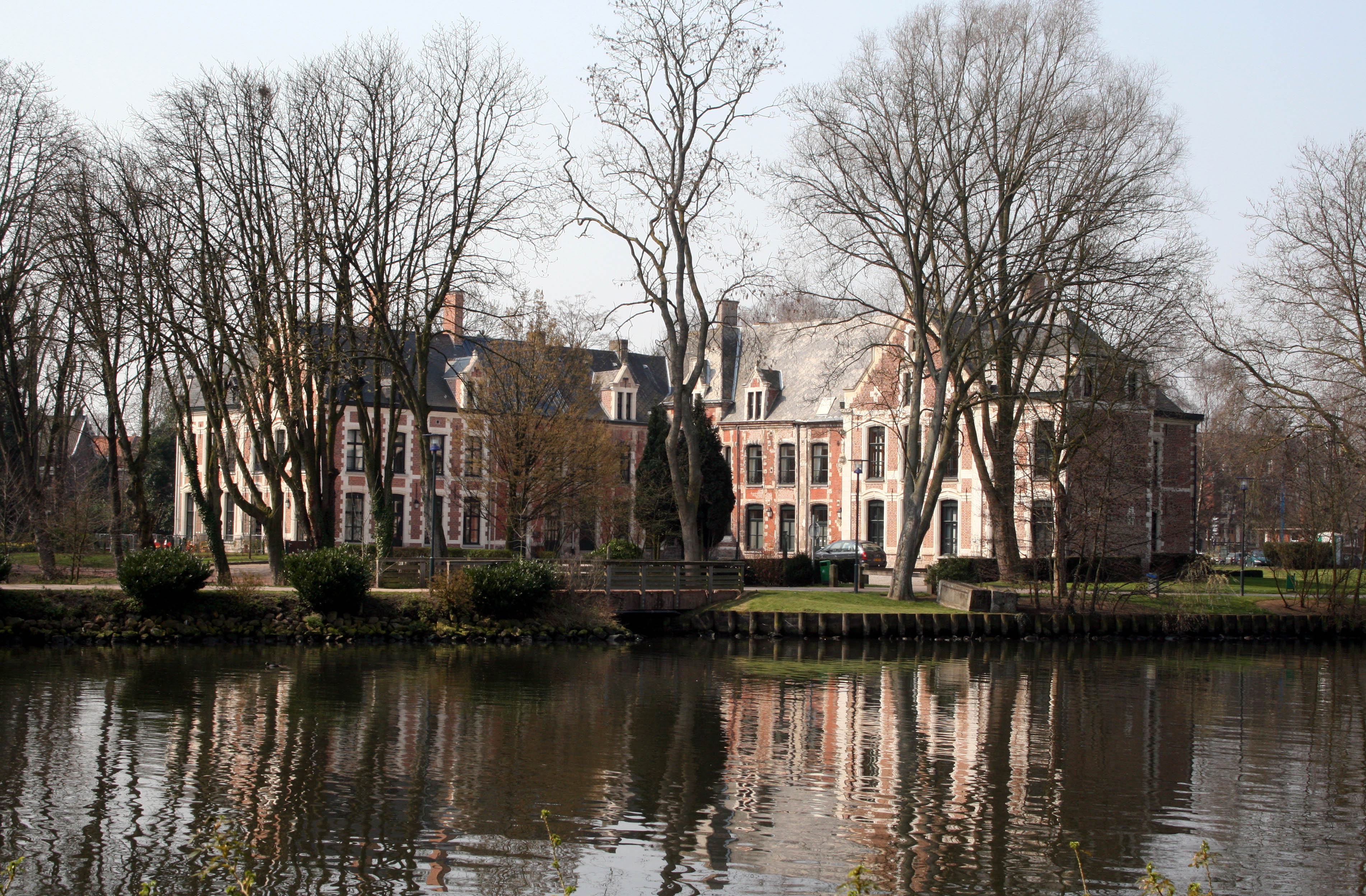 Chateau de Wambrechies